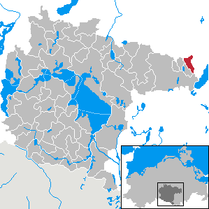 Mallin im Landkreis Müritz, Mecklenburg-Vorpommern